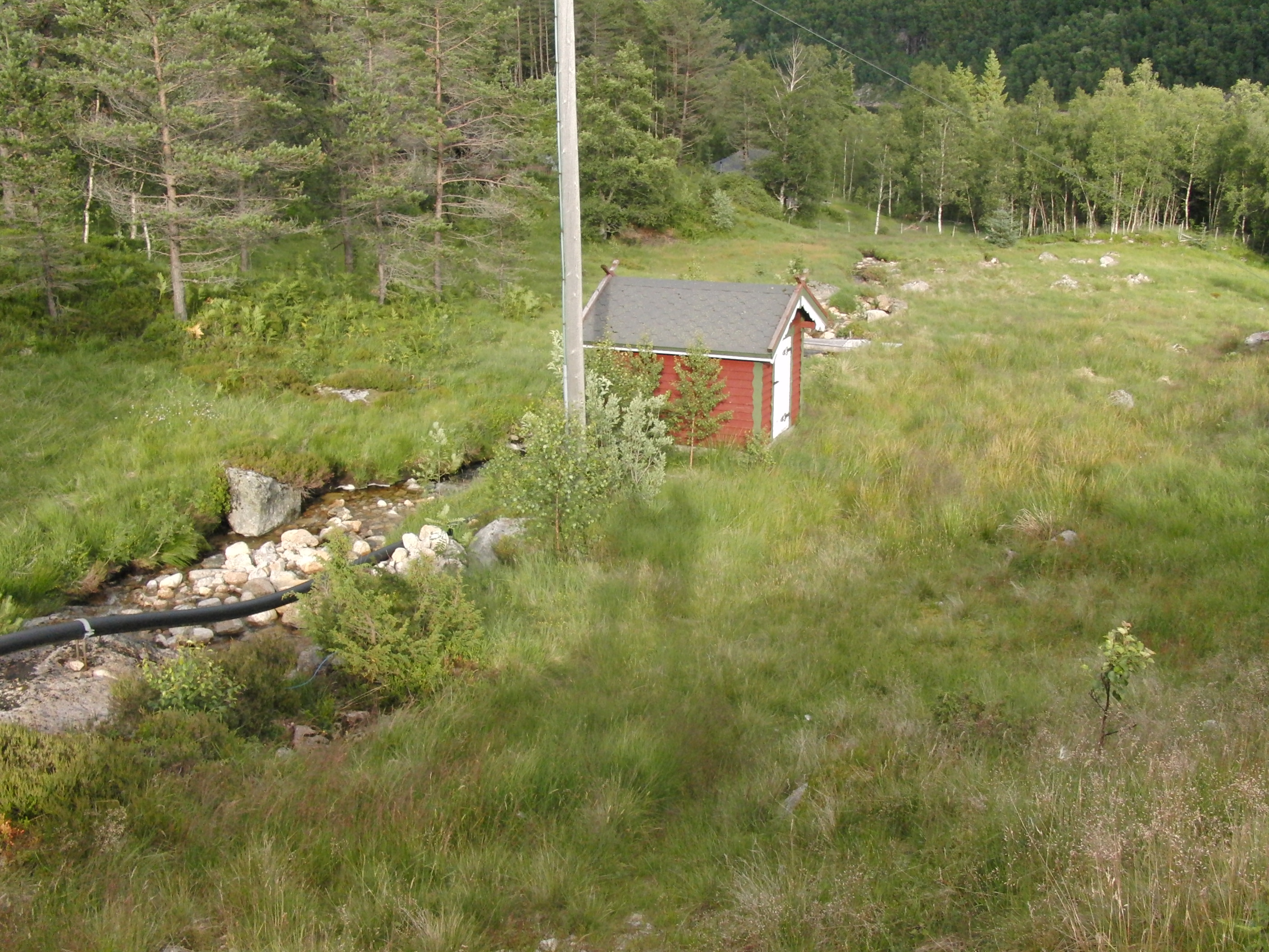 Indre Fossen kraftverk